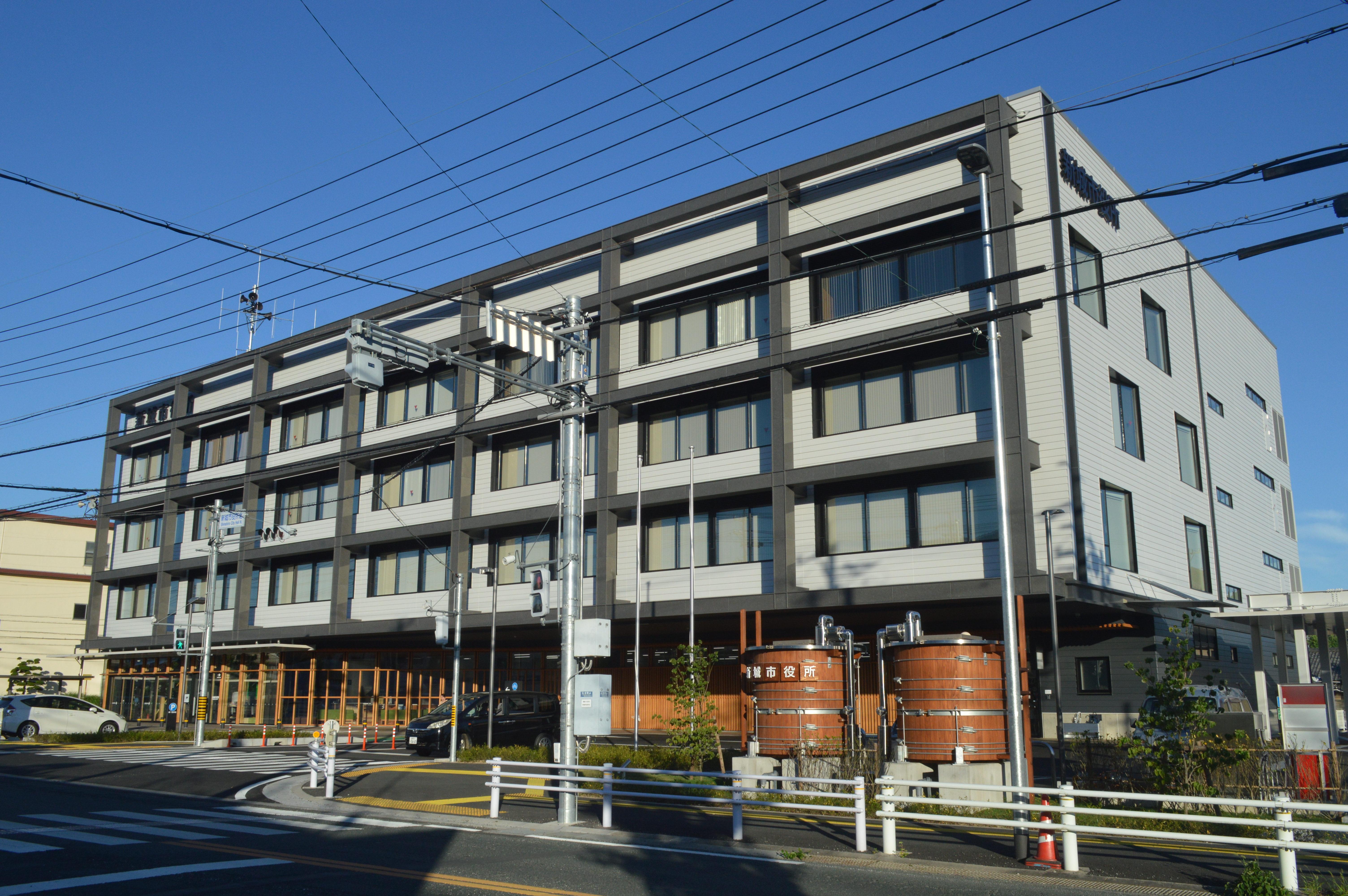 愛知県新城市の新城市役所。2018年5月7日に開庁した新庁舎。